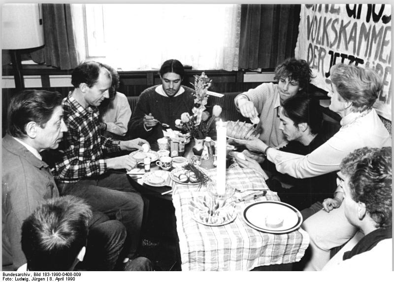 ADN- Ludwig 8.4.90-Erfurt: Die Hungerstreikenden in der ehemaligen MfS-Zentrale haben nach fast 12 Tagen ihre Kampfaktion abgebrochen und heute das erste Frühstück eingenommen. Vorausgegangen waren Gespräche mit Parlamentariern und dem noch amtierenden Minister Sebastian Pflugbeil, ein Schreiben des Komitees zur Auflösung des ehemaligen MfS-AfNS sowie Zusagen des Rates des Bezirkes. Danach sollen alle Forderungen der Bürgerwache, die seit Monaten mit der Volkspolizei für die Sicherheit der im Gebäude lagernden Akten sorgen, erfüllt werden.